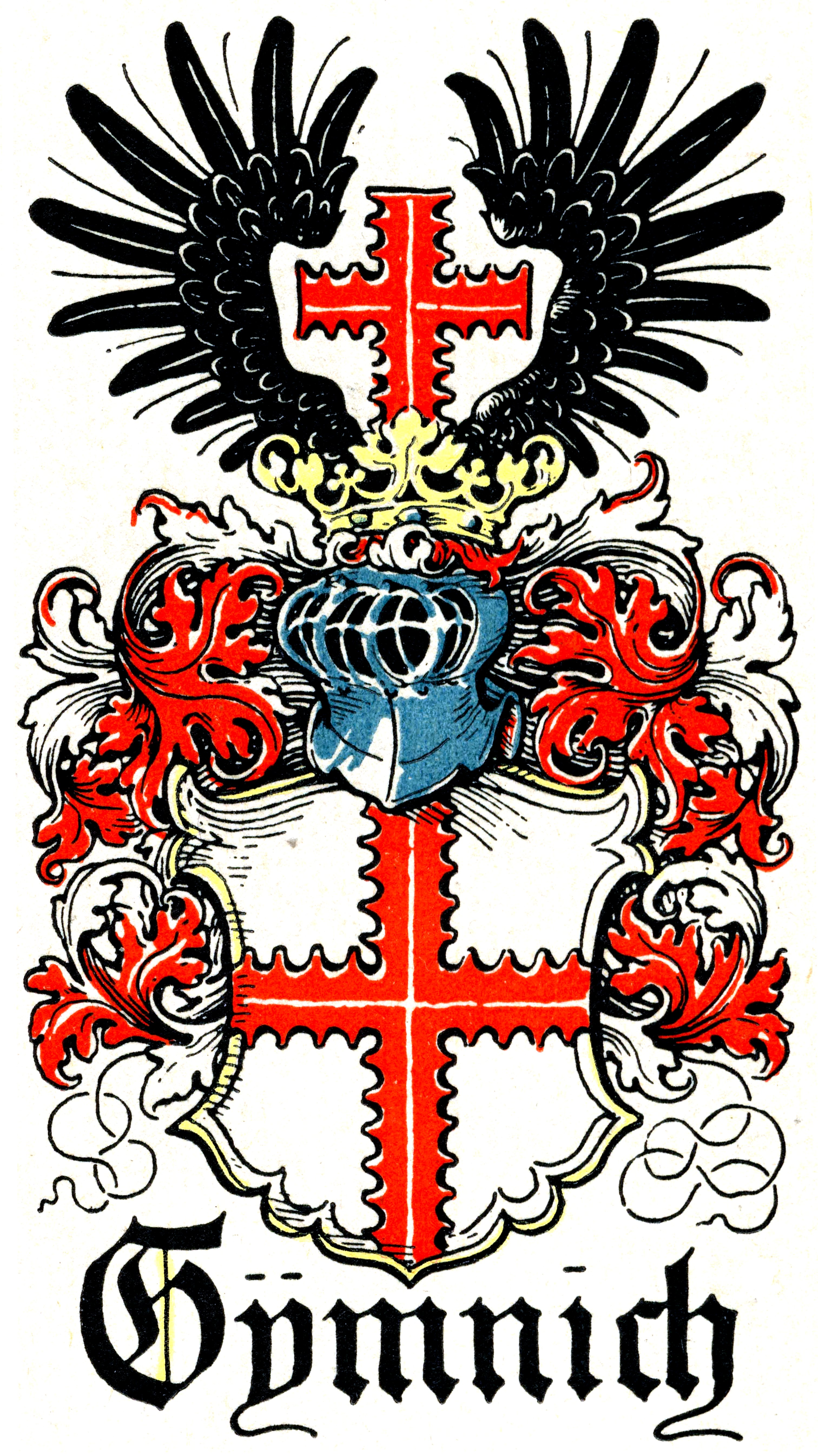 Wappen derer von Gymnich